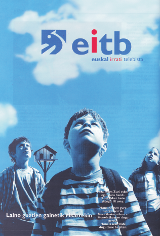 Euskal Irrati Telebista